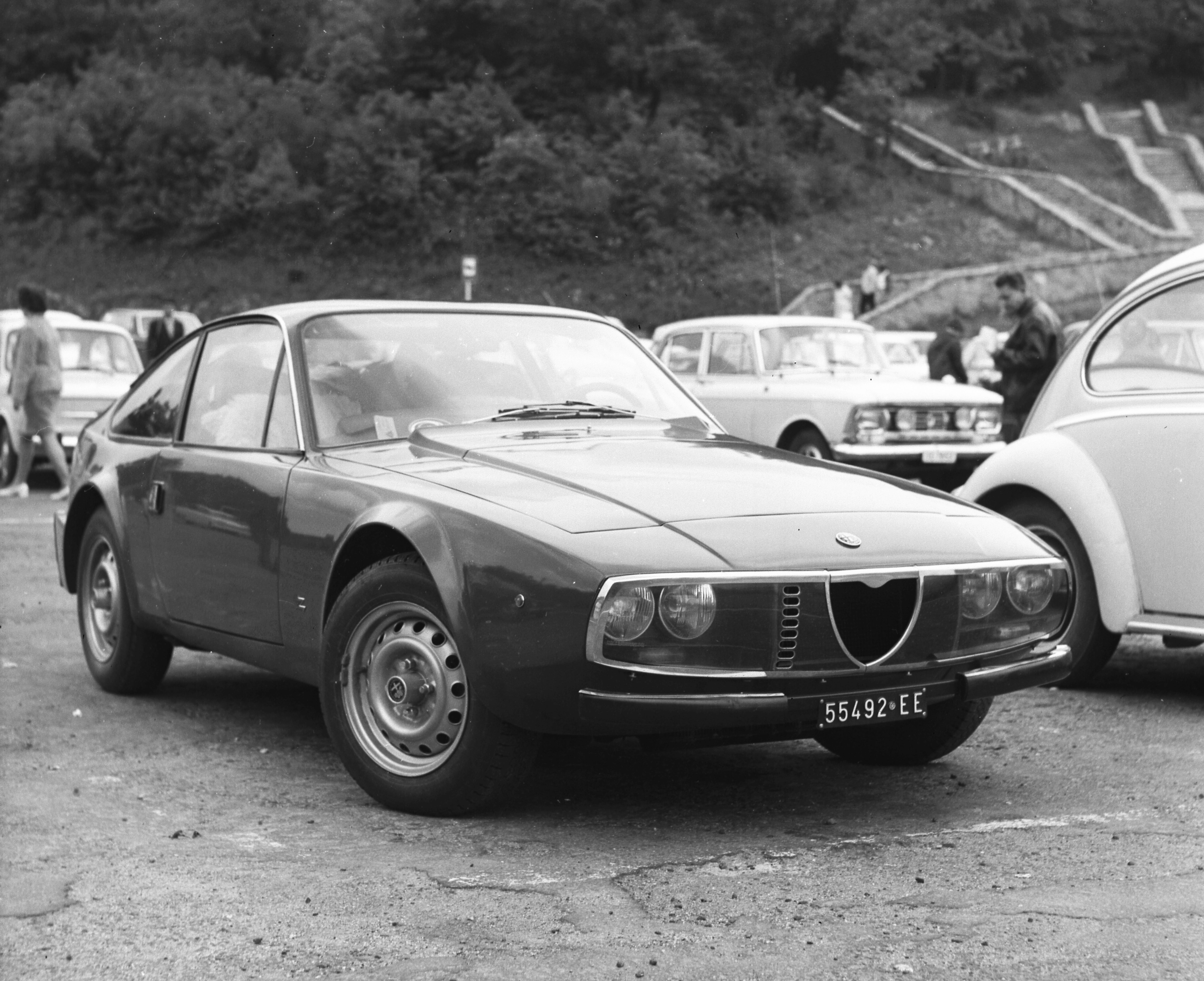 a Fellegvár előtti parkoló. Location: Hungary, Danube Bend, Visegrád Tags: automobile, number plate, Alfa-Romeo brand, Moskvitch-brand Title: a Fellegvár előtti parkoló.